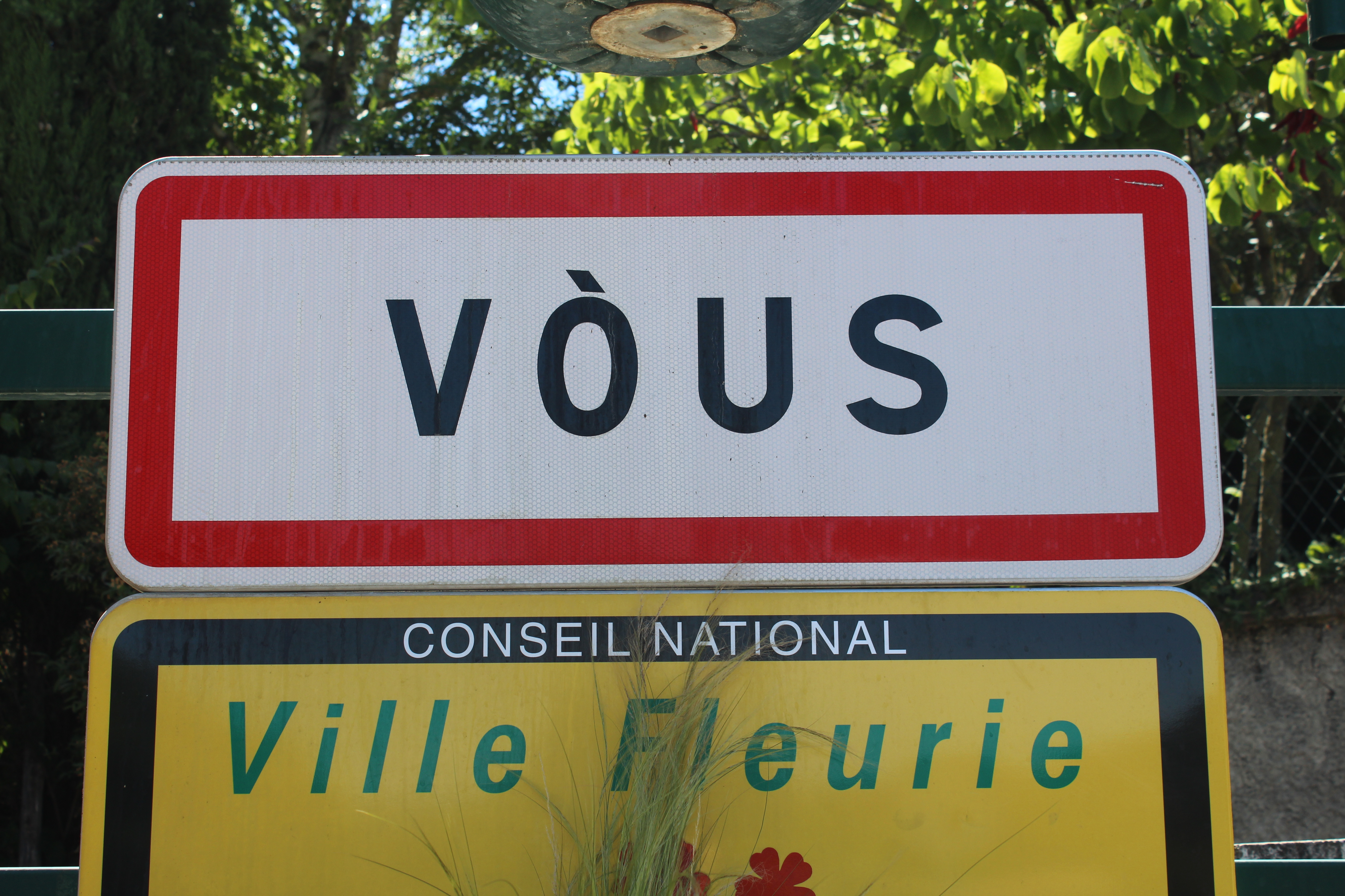 Panneau d'entrée de Vòus, inscription provençale de Volx.